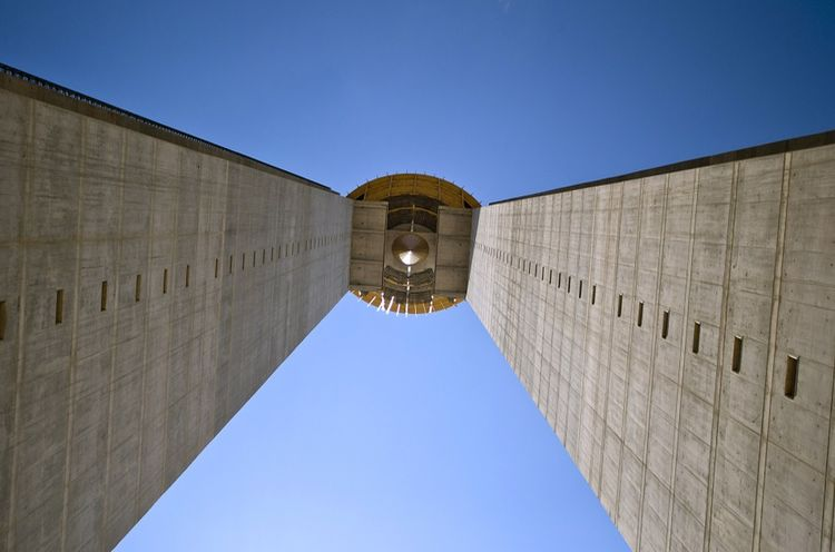 Intempo desde abajo entra las dos torres